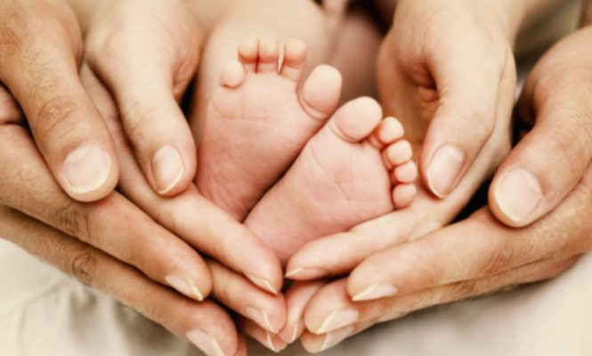 gurasotasuna